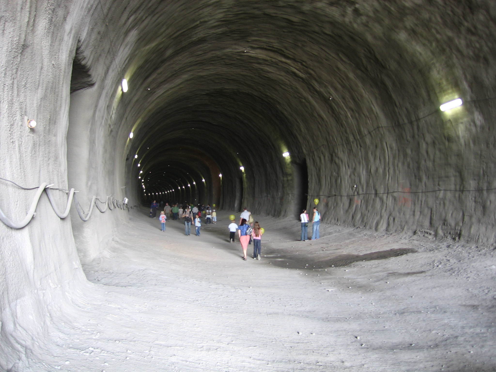 Interiér jednoho z tunelů Nového spojení, 30. 9. 2006